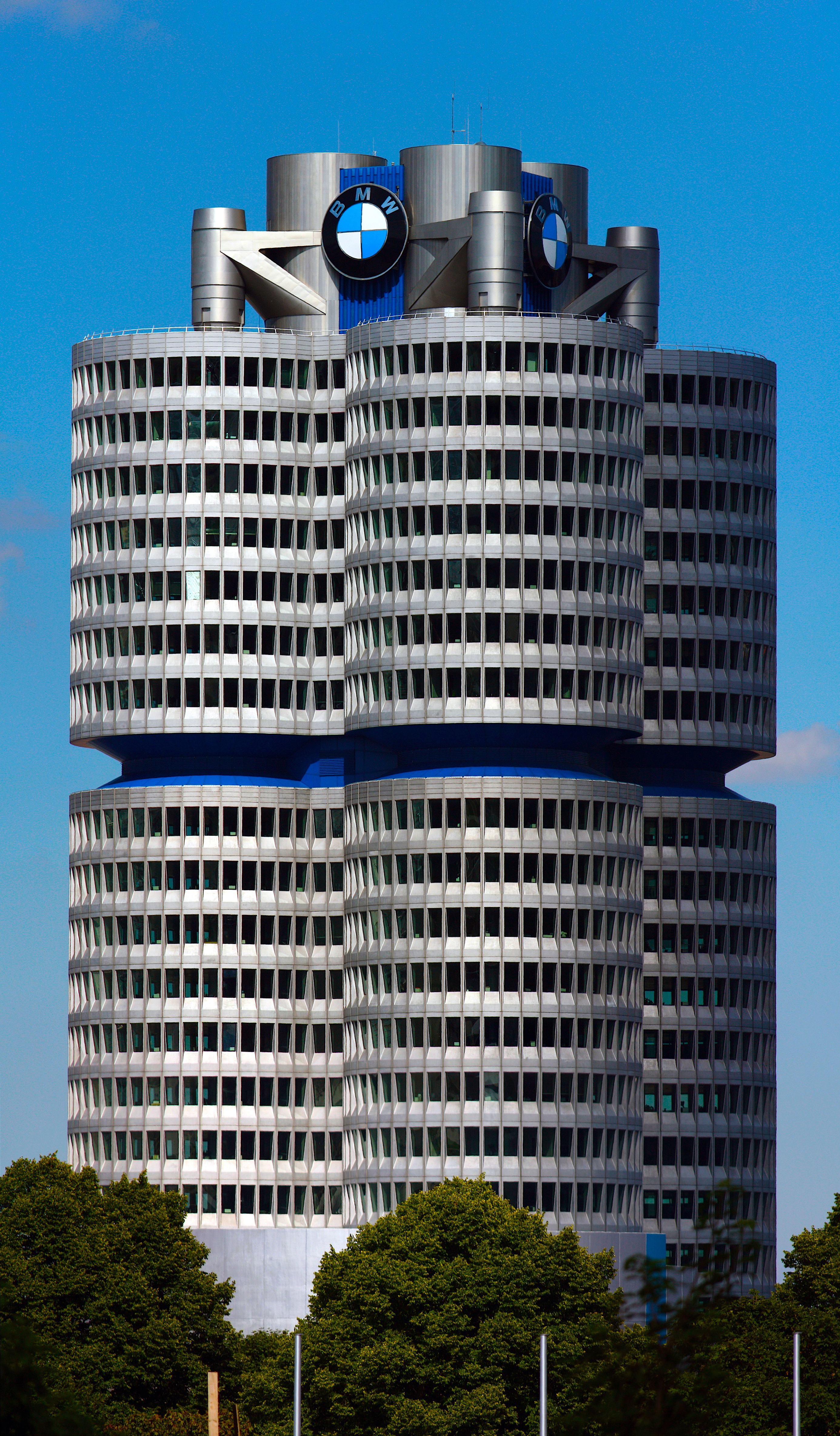 BMW Vierzylinder-Turm